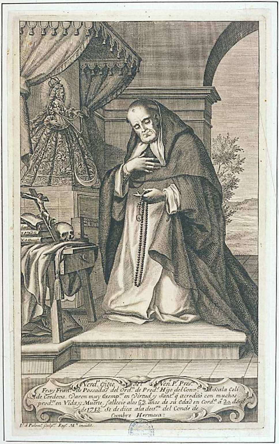 Retrato del beato Francisco de Posadas. Grabado calcográfico. Inscripción: "Verd.ª efigie del Ven.e P.e Pres.do Fray Fran.co de Possadas del Ord.n de Pred.s Hijo del Conv.to d Scala Celi de Cordova. Varon muy Exemp.ar en Virtud, y sant.d q. acreditò con muchos prod.os en Vida, y Muerte. fallecio a los 69. años de su edad en Cord.a á 20. d. Sep.e de 1713. Se dedica a la dev.on del Conde de Cumbre Hermosa". Biblioteca Nacional de España